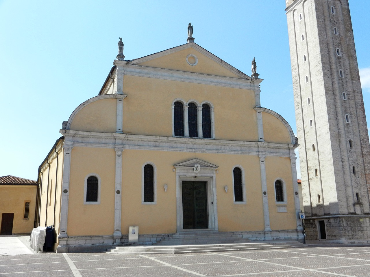 Sacile - Duomo di S. Nicolò